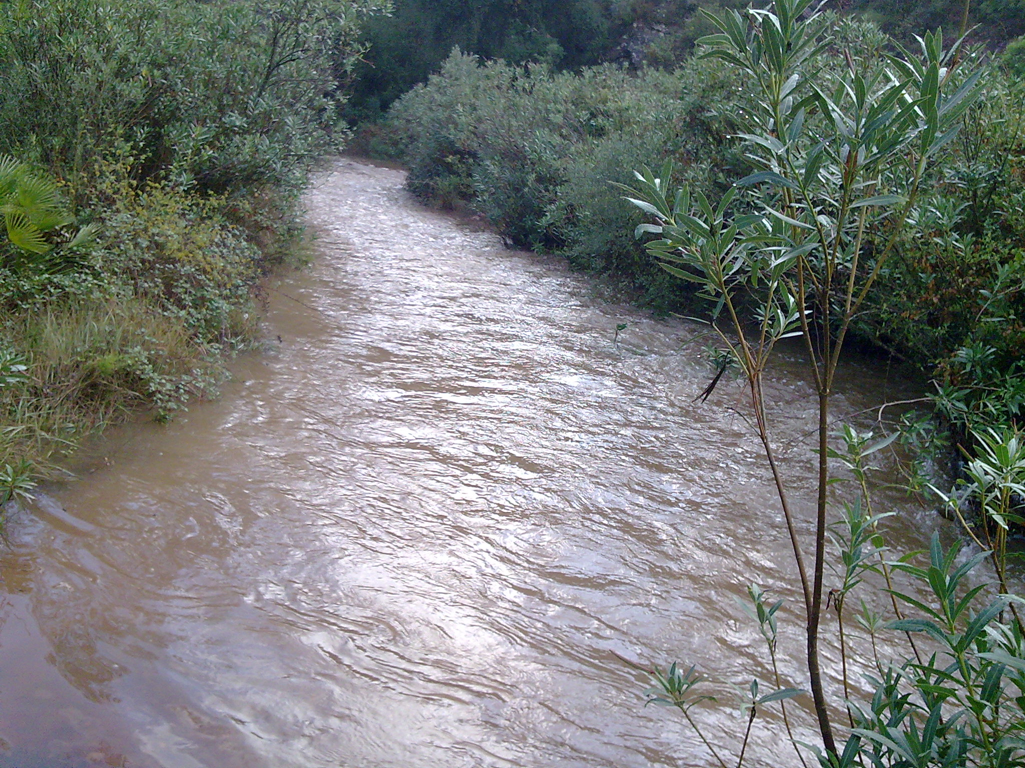 Barranco de Ahín o de l'"Ullastre".